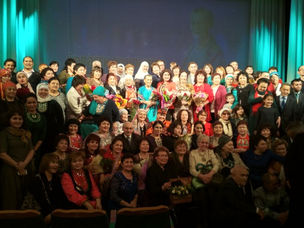 Башҡортса: Тамаша Өфөлә Башҡорт академия театрында үтте. 2018 йылдың декабре.